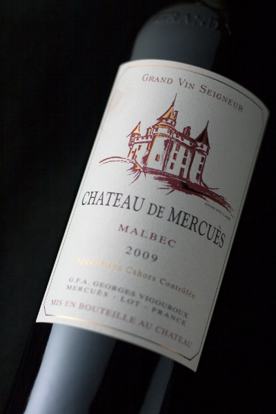 Cuvée Grand Vin Seigne du Château de Mercuès : Malbec (80%), Merlot (10%) et Tannat (10%)